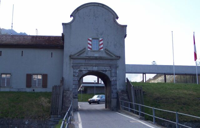 St. Luzisteig